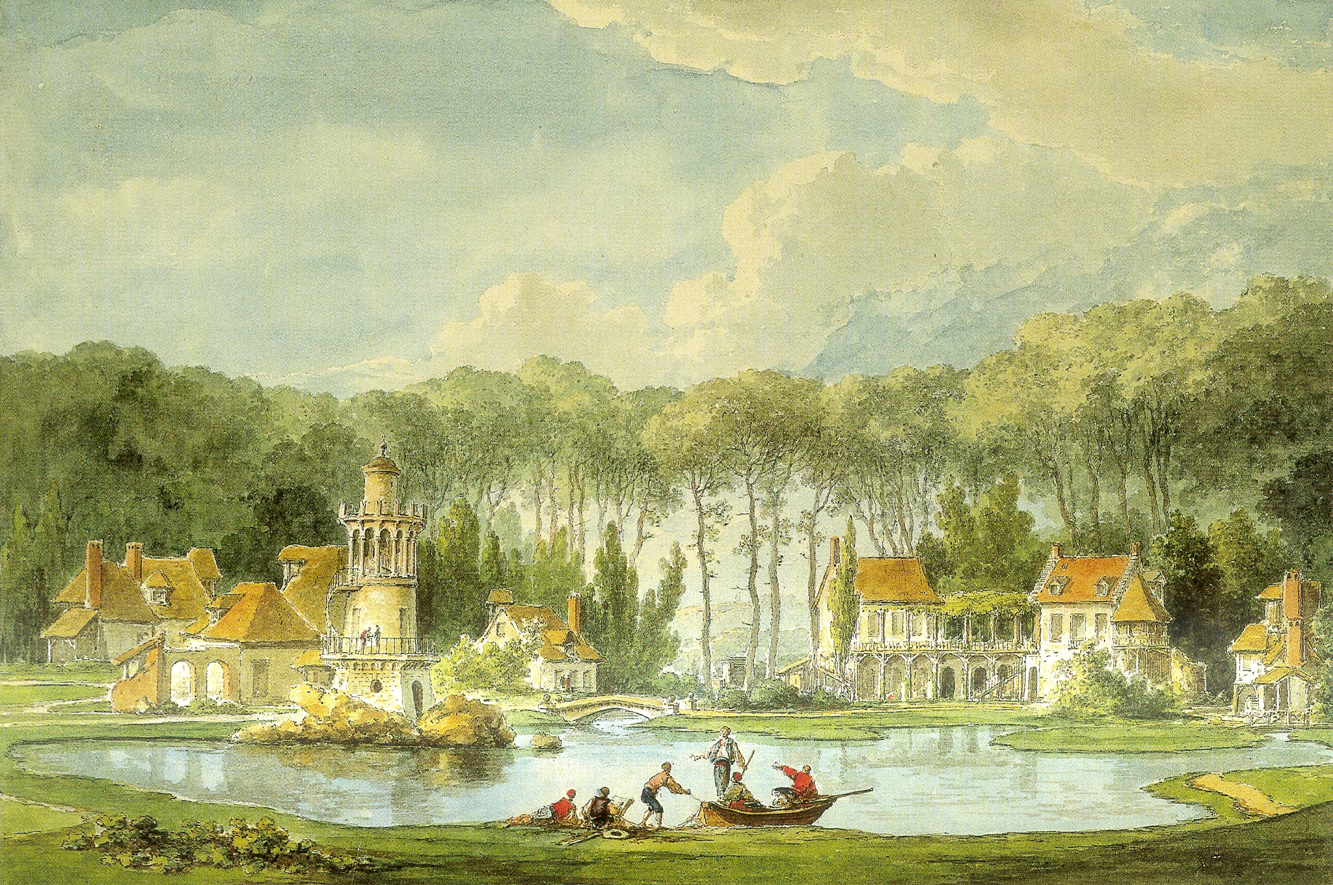 Hameau de la Reine, Trianon, Château de Versailles « Vue du hameau prise en avant de l'étang », 1786, Aquarelle de Claude Louis Chatelet